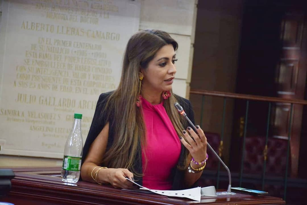 Matiz durante una intervención en el congreso de la república sobre el tema del feminicidio